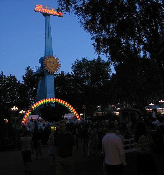 Åkattraktionen Rainbow på Liseberg, 23 augusti 2002.